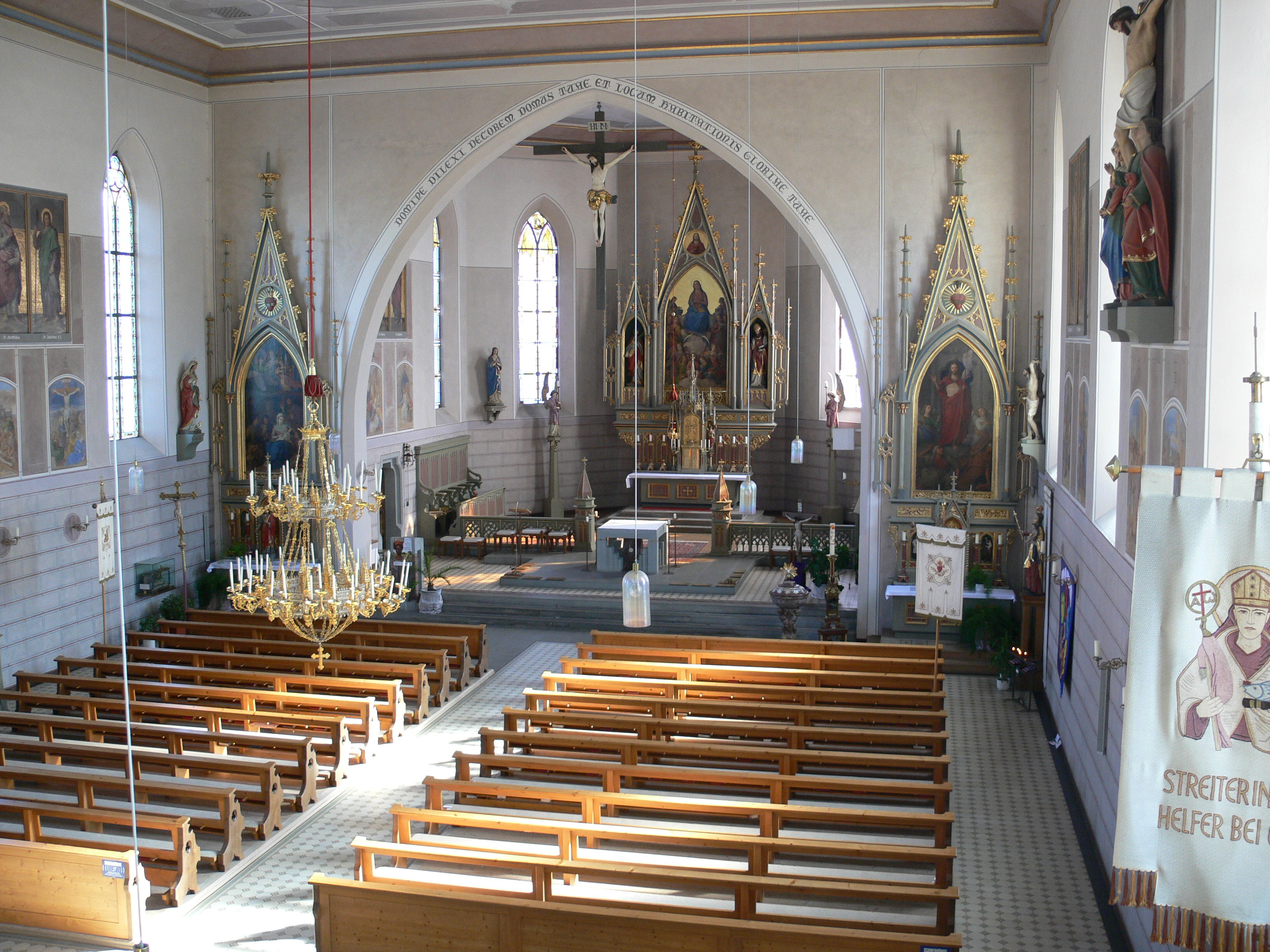 Pfarrkirche St. Margareta, Heimenkirch, Landkreis Lindau, Bayern Blick durch das Langhaus zum Chor